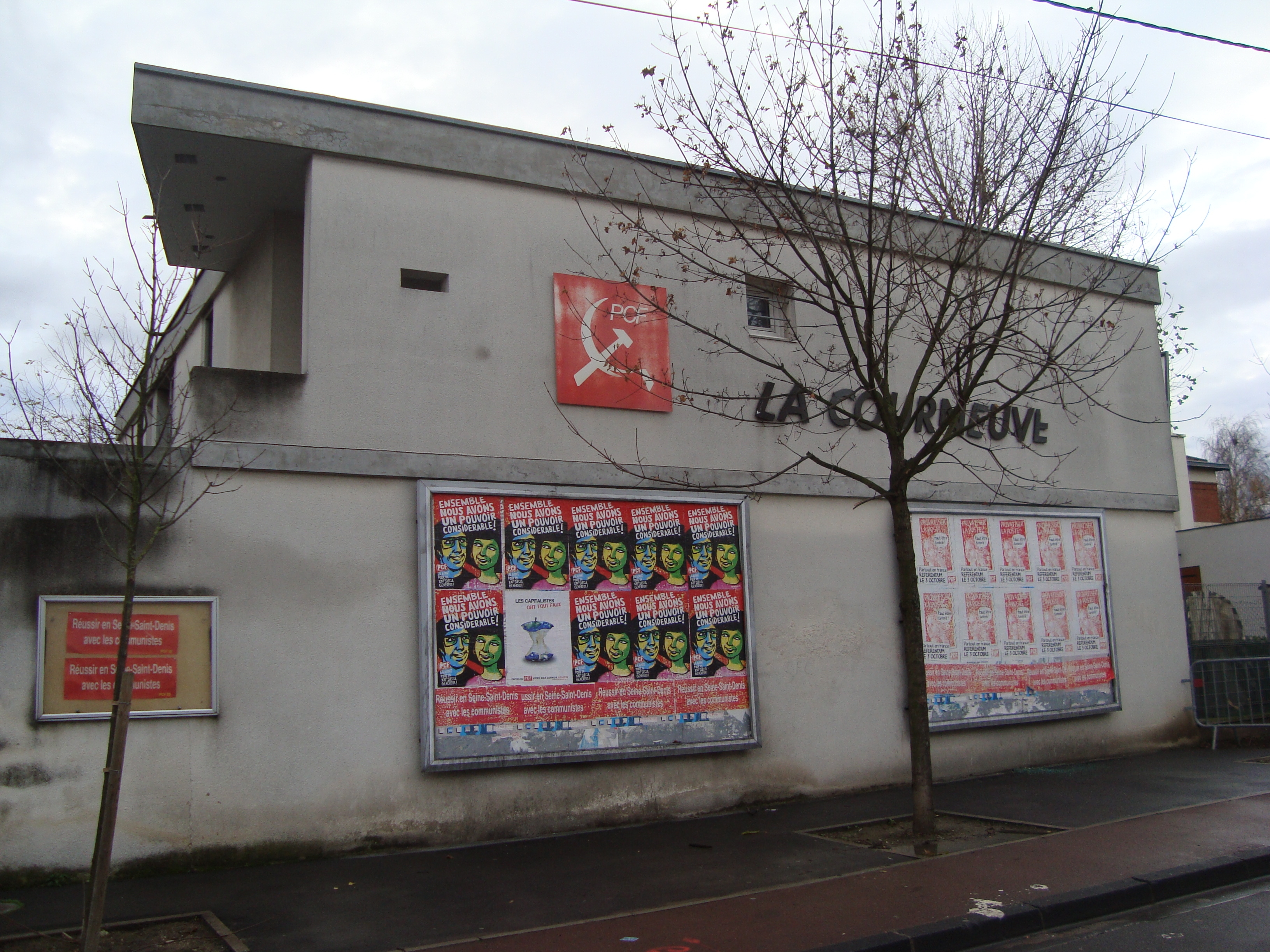 Façade du local du Parti communiste de La Courneuve fin 2009.